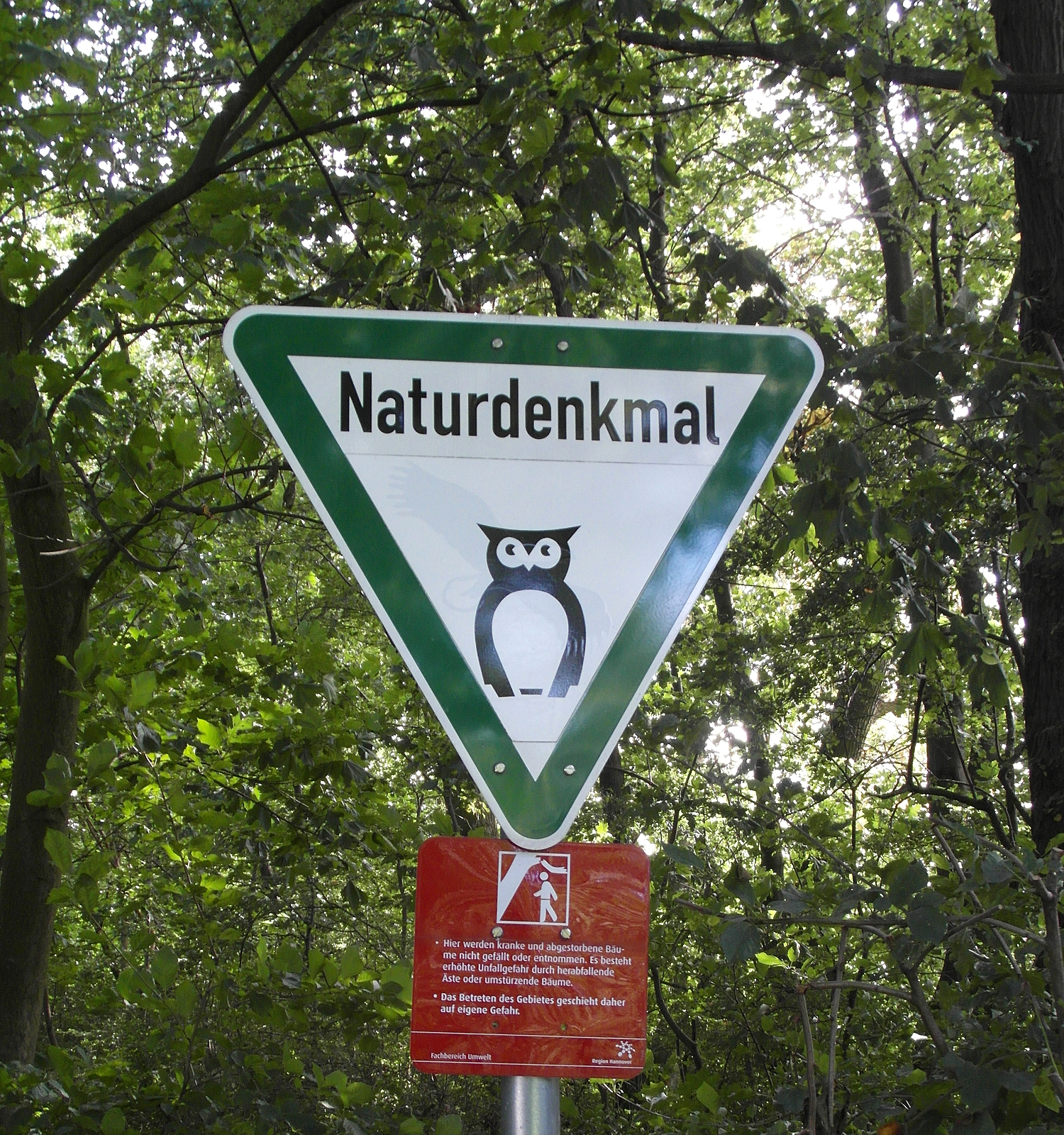 Der Baumbestand am Osterteich östlich des Gehrdener Stadtteils Lenthe ist 1648 im Zeichen des Friedensschlusses (Westfälischer Friede als Abschluss des Dreißigjährigen Krieges) gepflanzt worden.